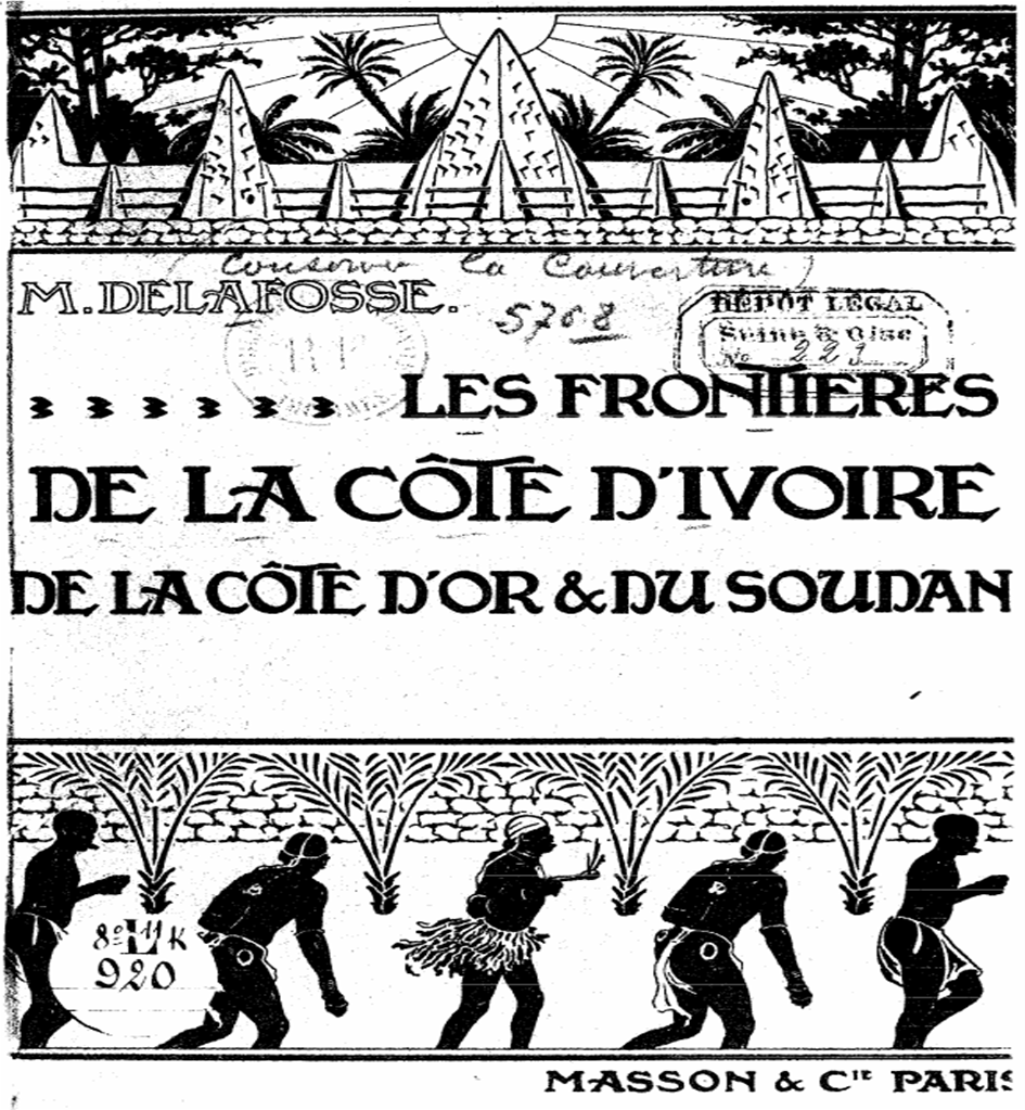 Première page de Les frontières de la Côte d'Ivoire, de la Côte d'Or et du Soudan, de Maurice Delafosse, Paris, Masson, 1908, 256 p.